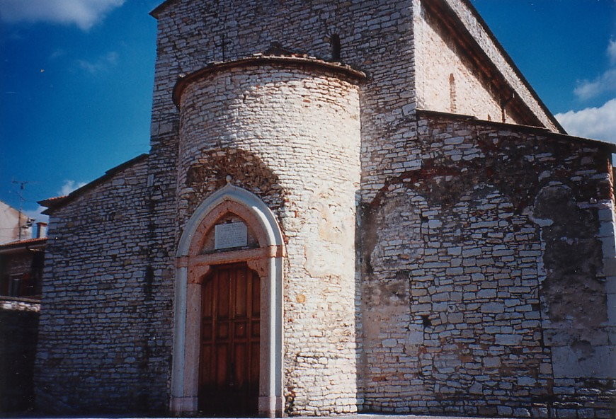 Chiesa di San Giorgio nell'omonima frazione del comune si Sant'Ambrogio di Valpolicella, Verona. Particolare dell'abside.